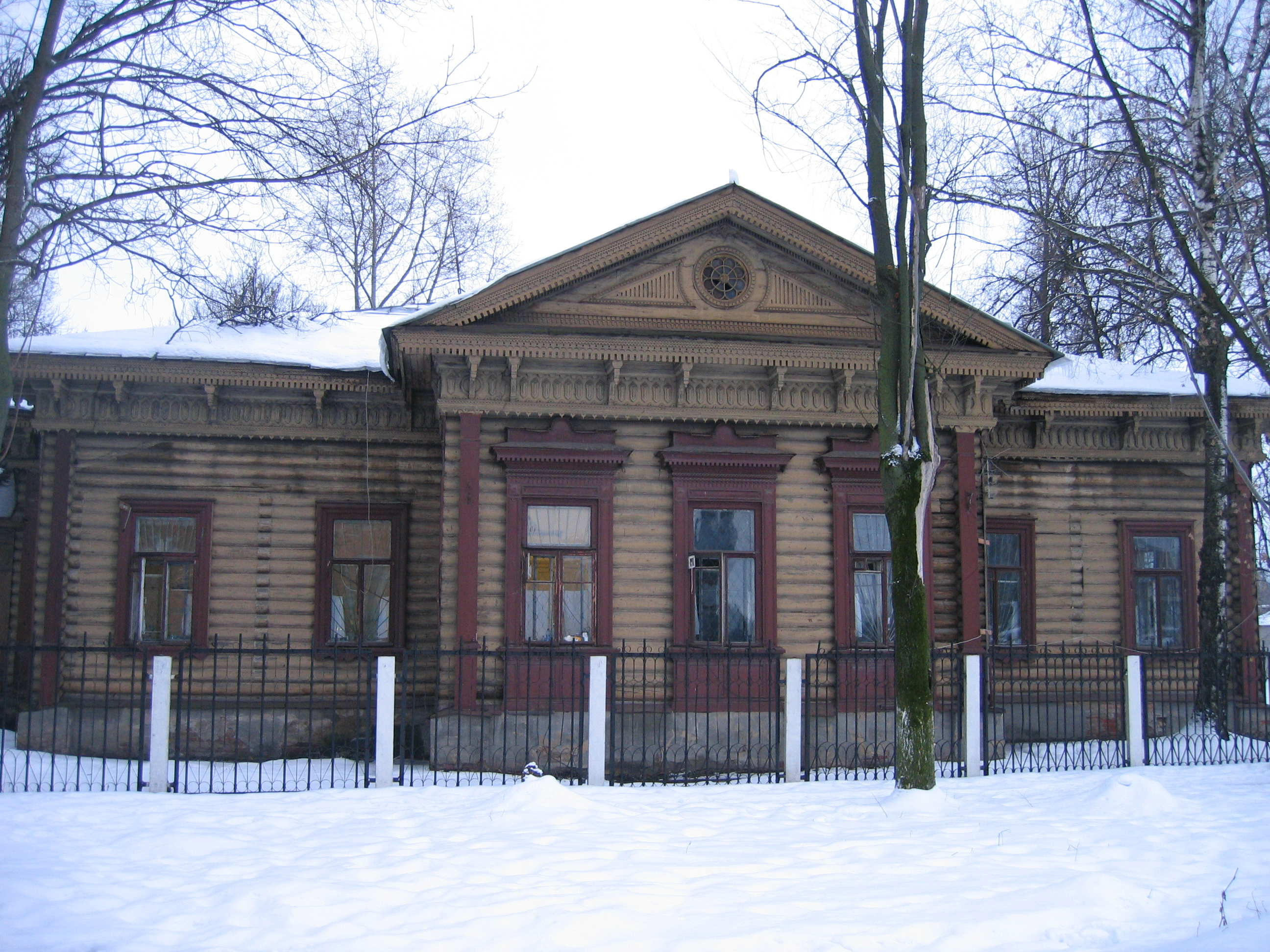 Ein Holzhaus in Orechowo-Sujewo, Russland